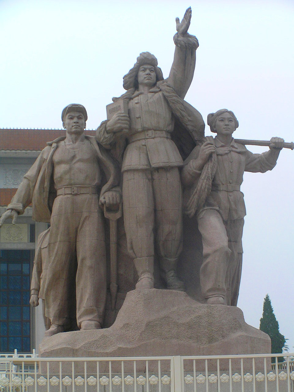 毛主席紀念堂前彫像